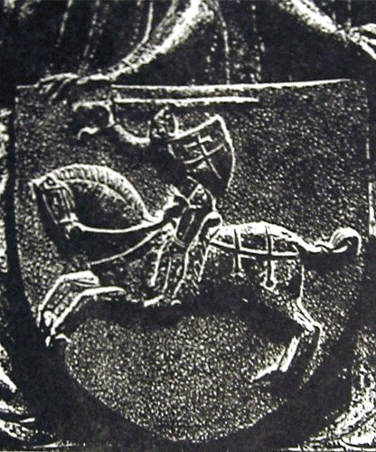 Беларуская (тарашкевіца): Герб «Пагоня» з надмагільнай пліты Ягайлы